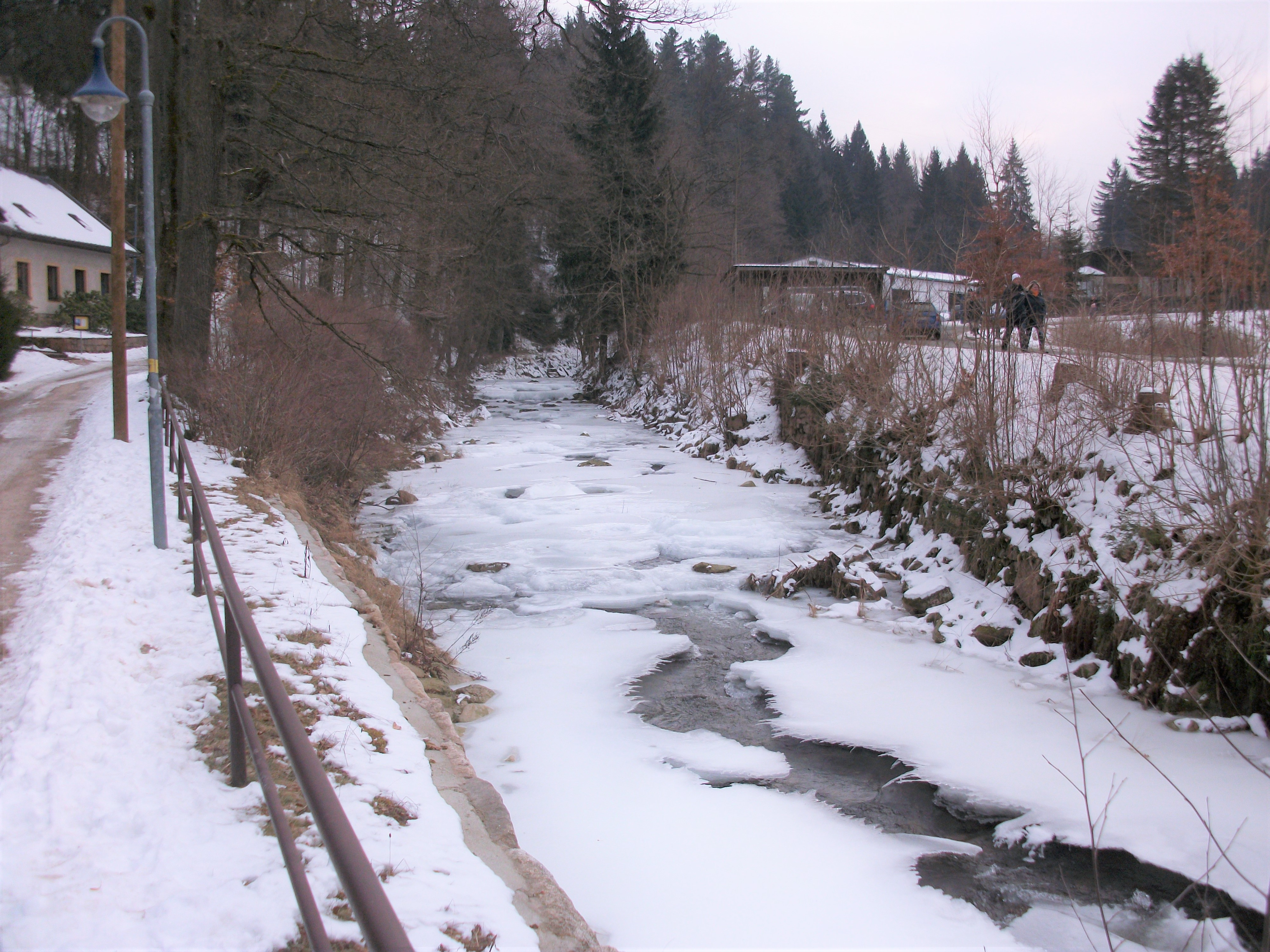 Große Bockau in Blauenthal im März 2018